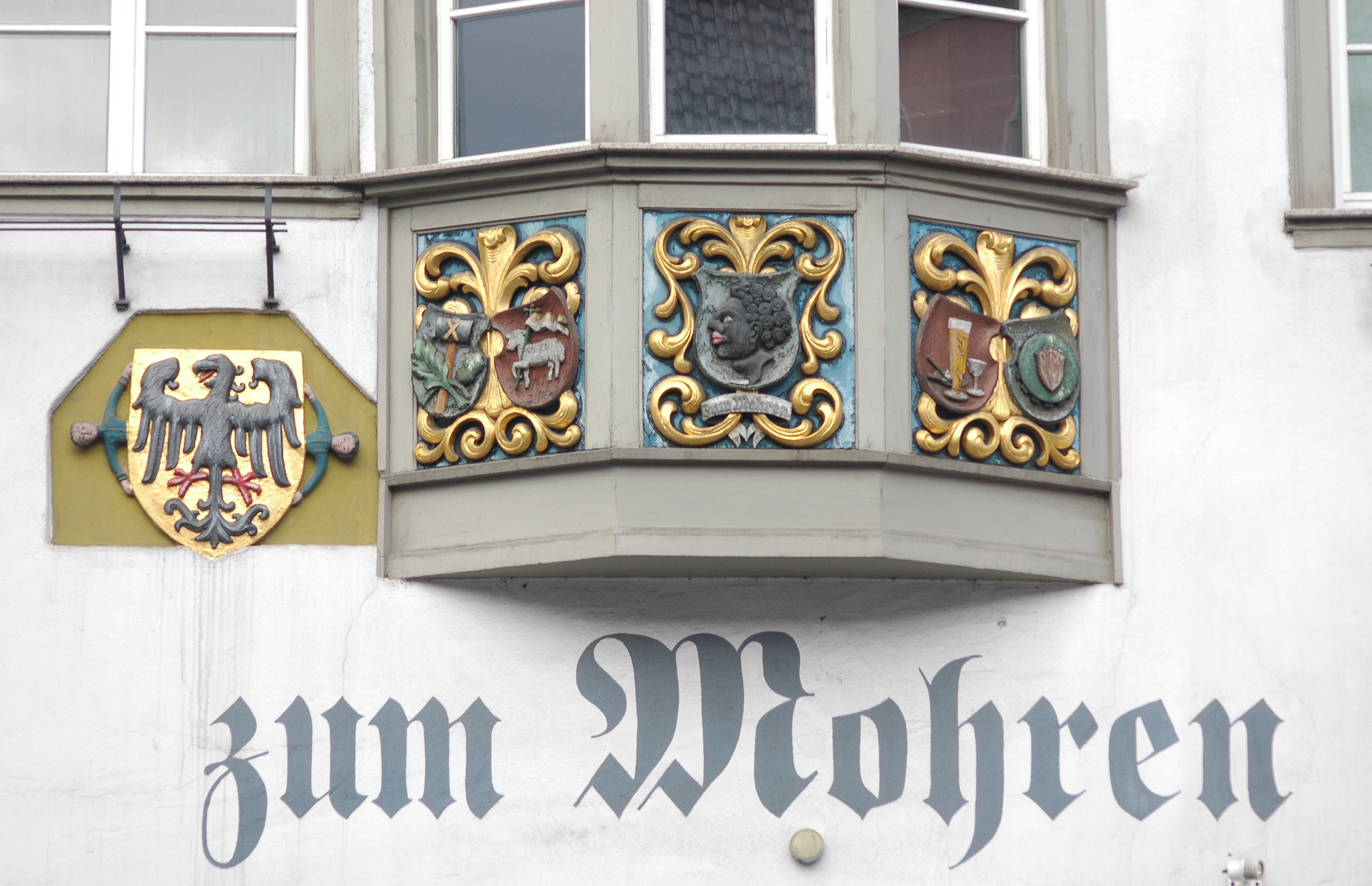 Gaststätte zum Mohren in Rottweil,15. April 2006.